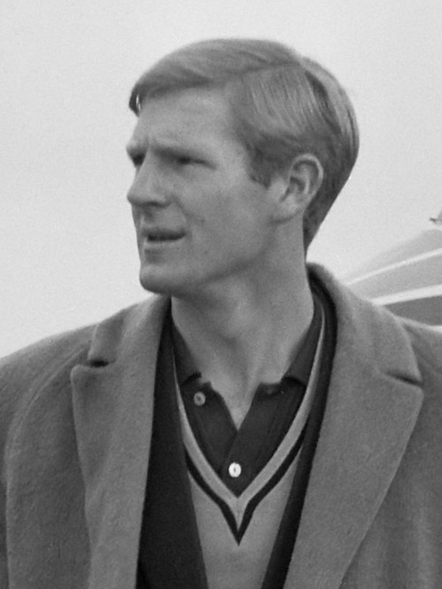 Aankomst elftal Tottenham Hotspur op Zestienhoven. Speler Frank Saul 31 oktober 1961